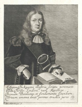 Porträt des Juristen Nicolaus Beckmann (1634-1689), aus Heide in Dithmarschen, Prof. in Lund, Rat des Kardinals zu Baden.